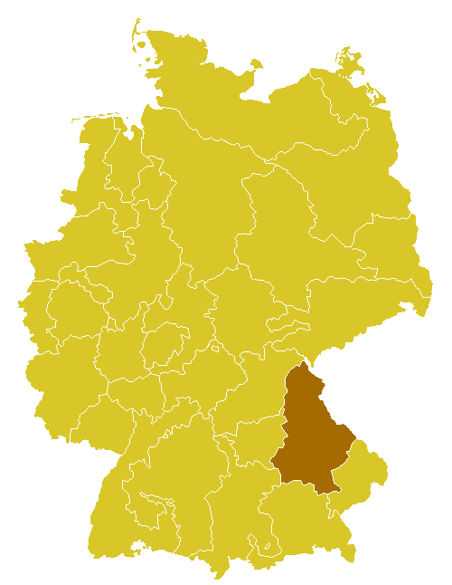 Katholische Diözese/Bistum in Deutschland Autor: Benutzer:WikiNight